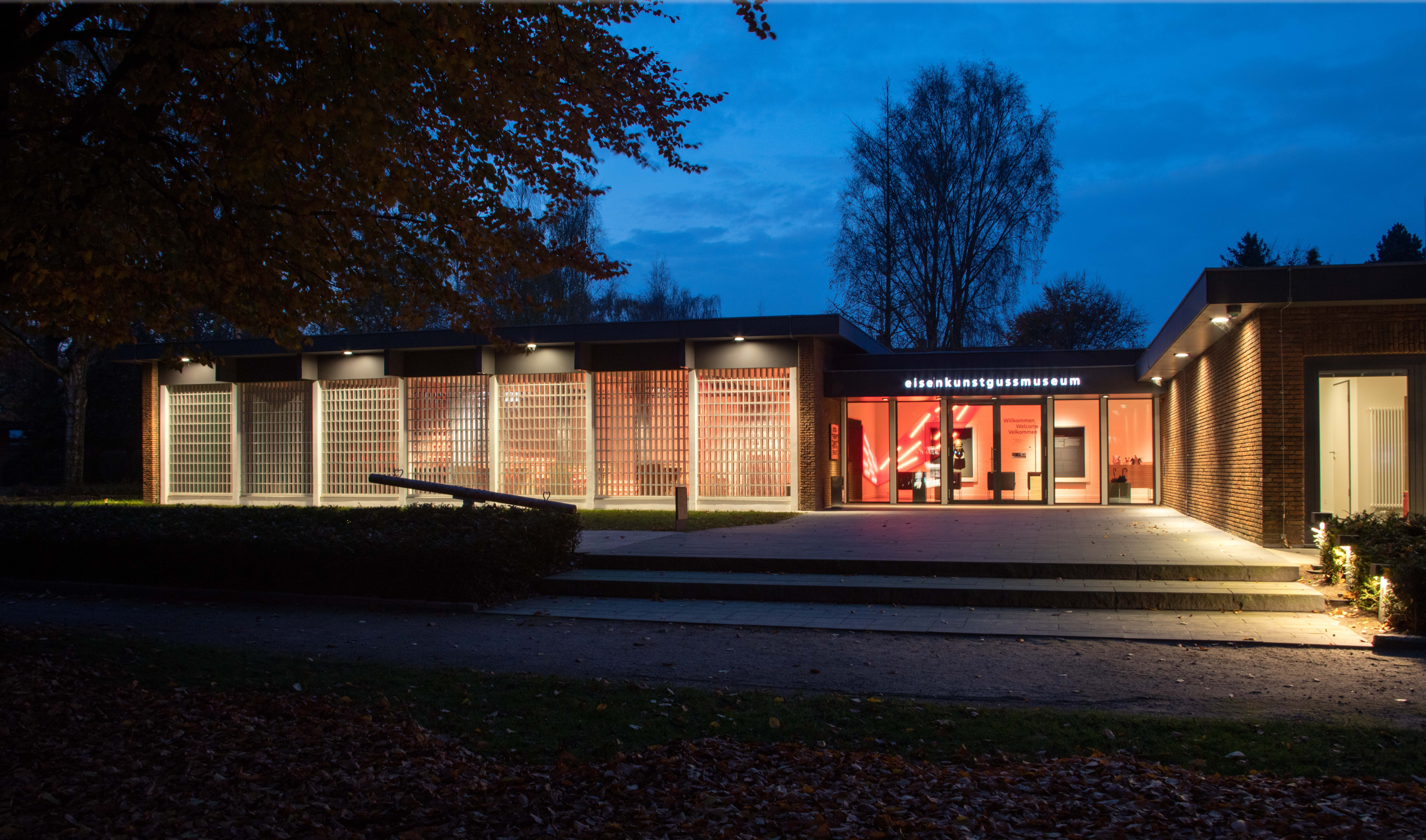 Abendansicht.